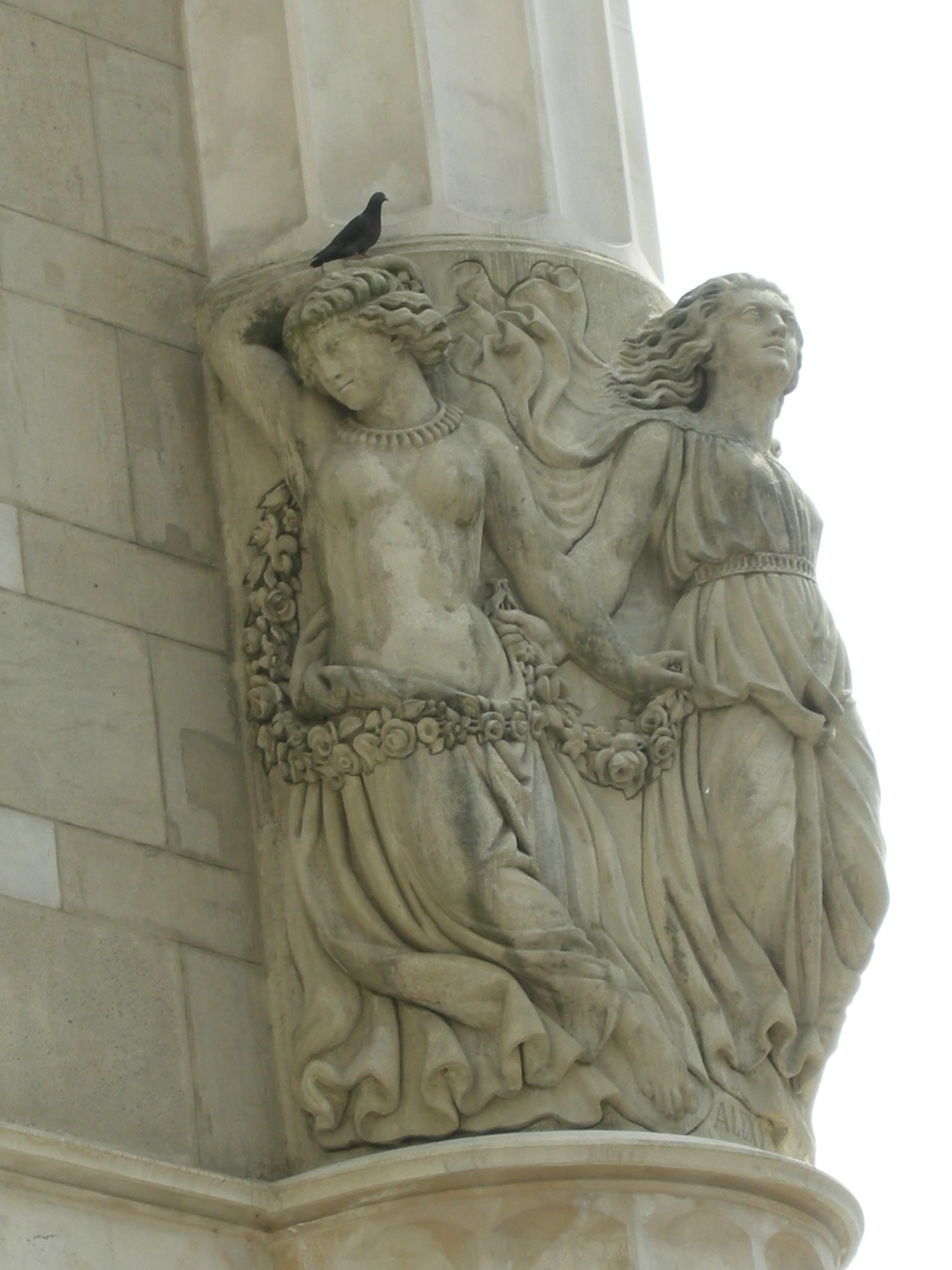 Budapest